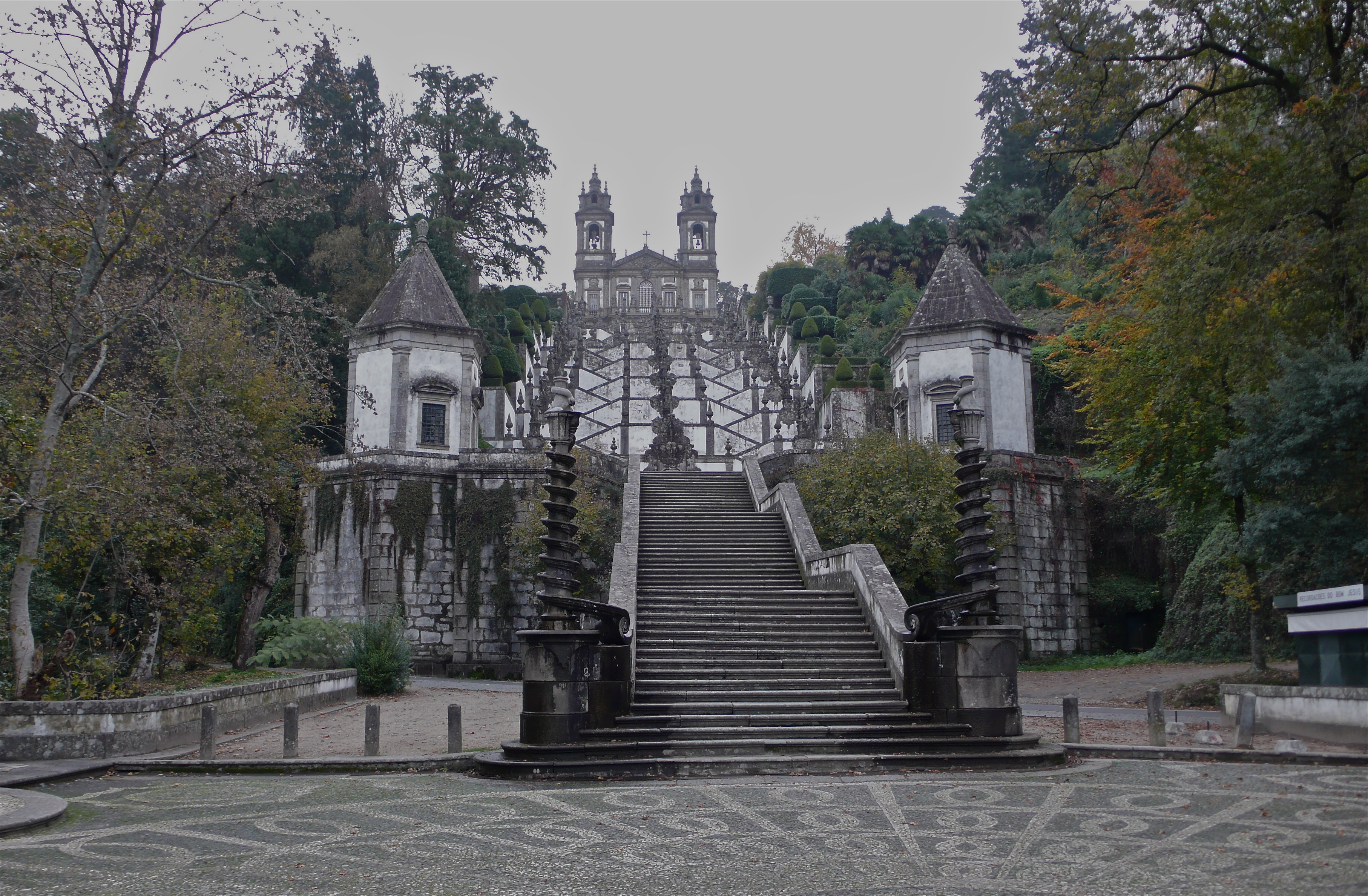 Bom Jesus